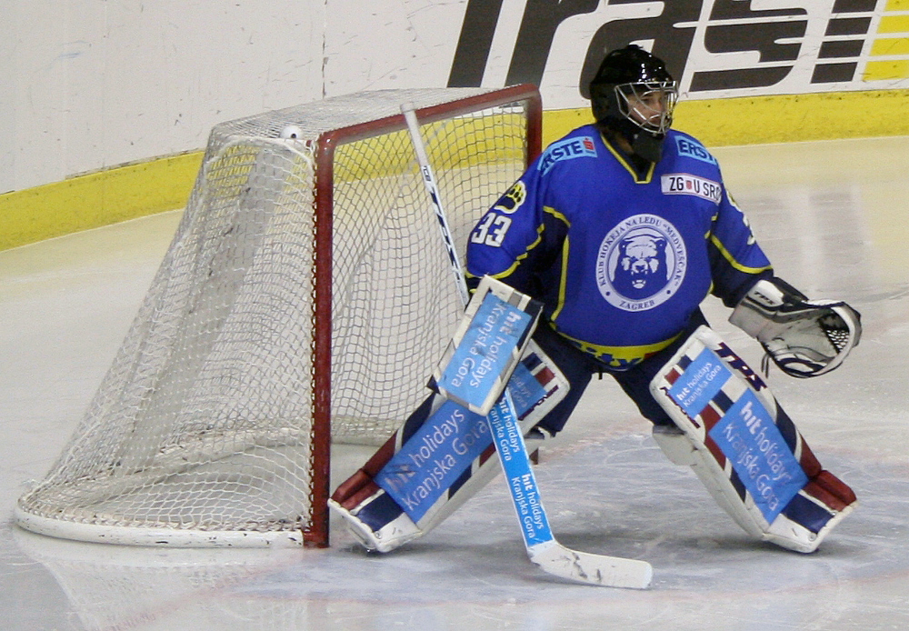 Robert Kristan u Zagrebu